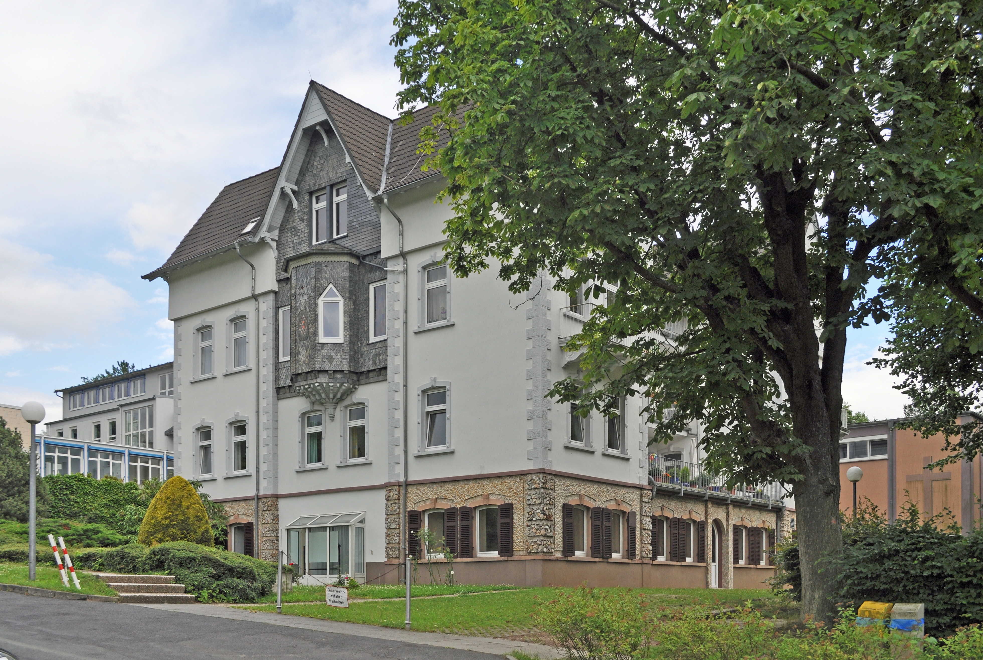 Gonzenheim, Weinbergsweg 60, Maria Ward Schule